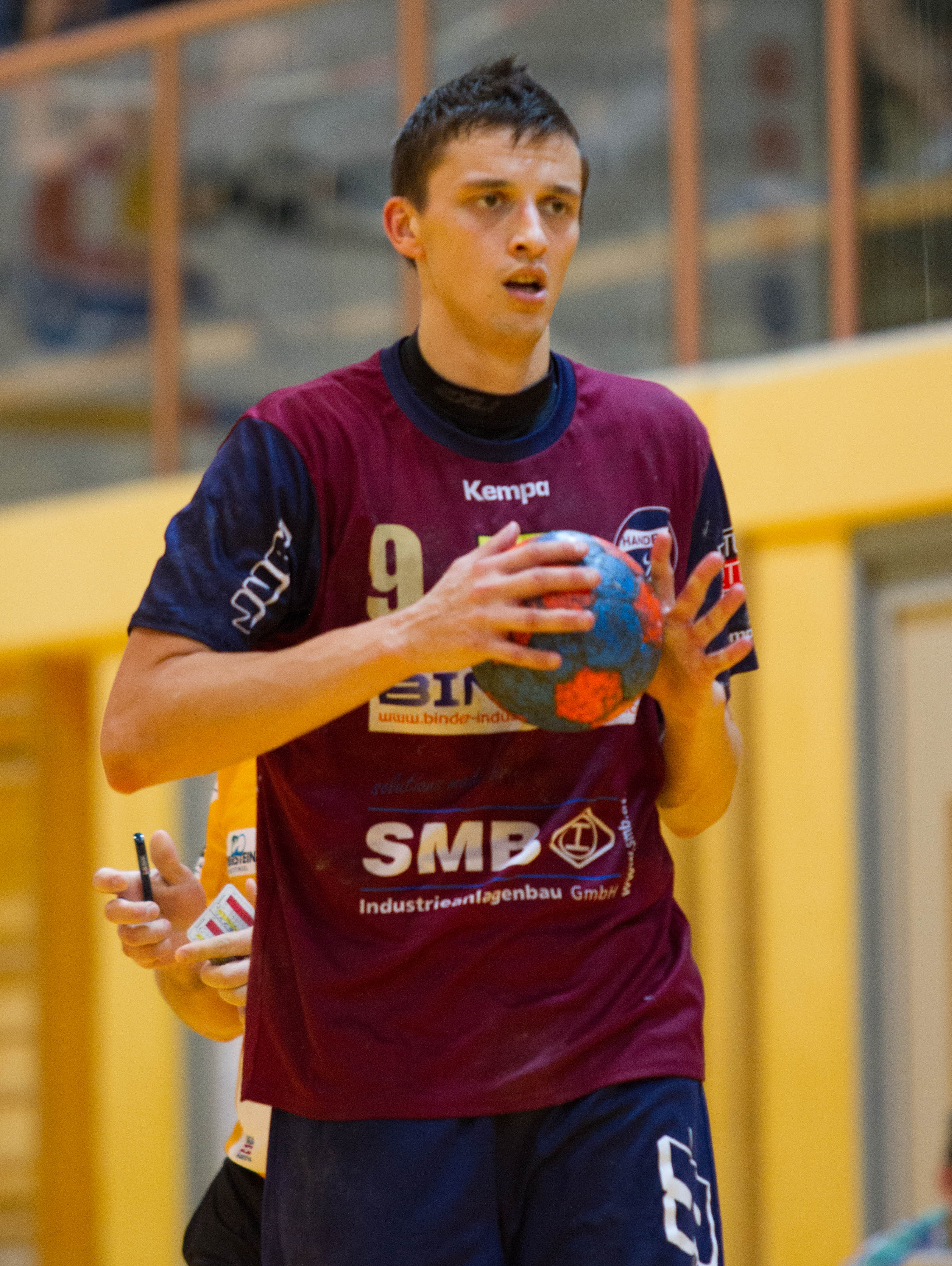 Sasa Barisic-Jaman